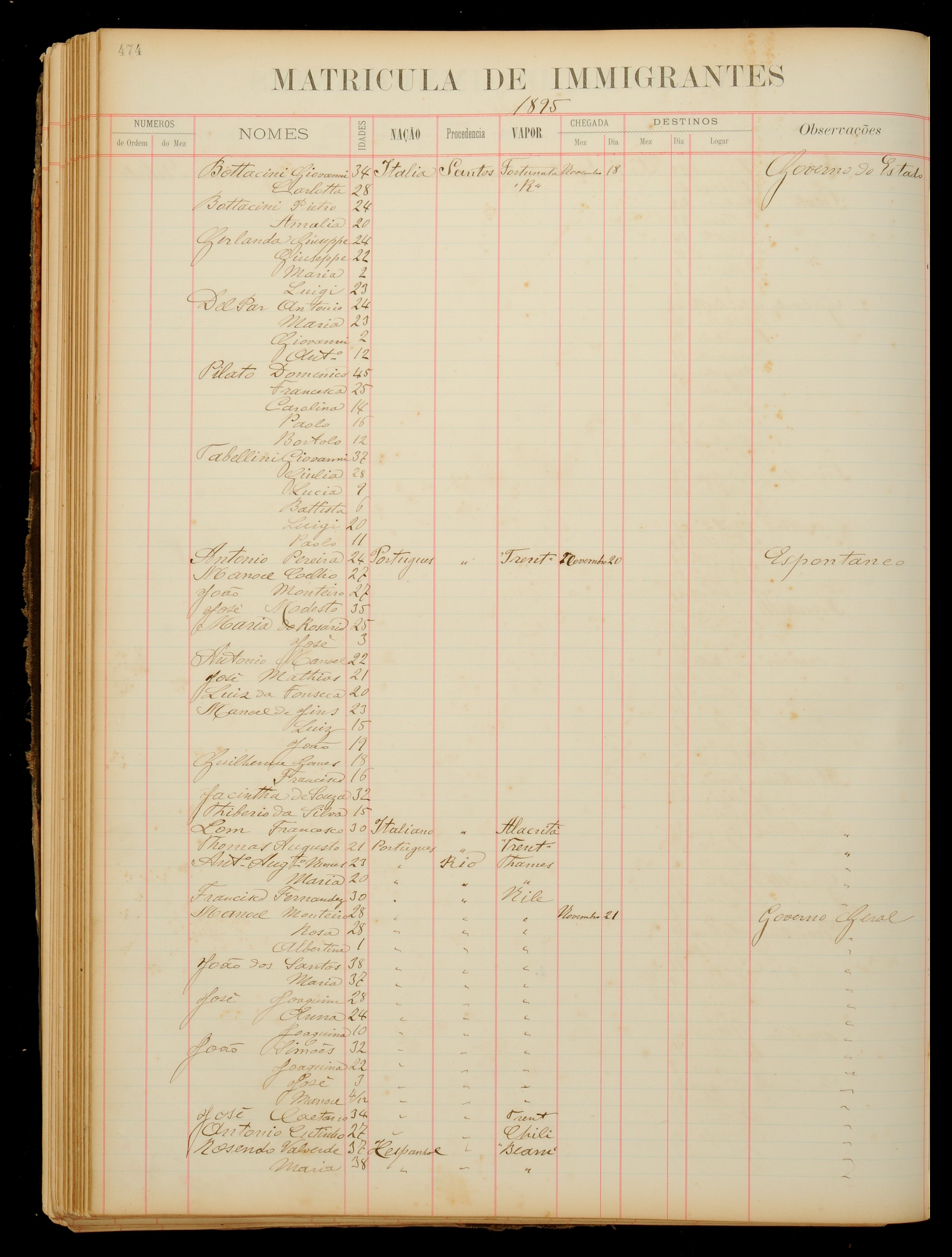 Documentação do livro 015, pág. 054, familia 0036 de matricula de imigrantes no porto de Santos.